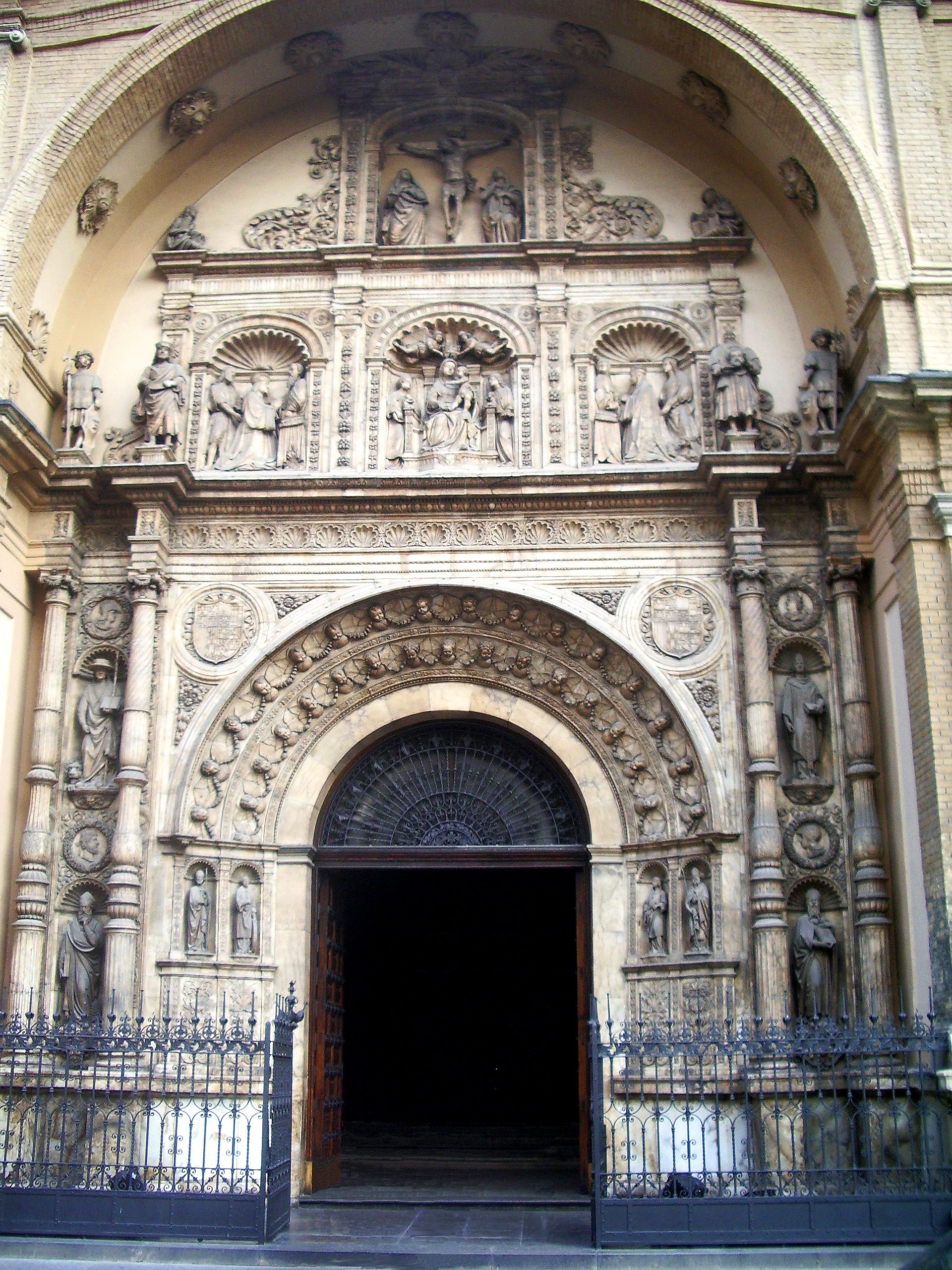 Portada de la iglesia de Santa Engracia de Zaragoza